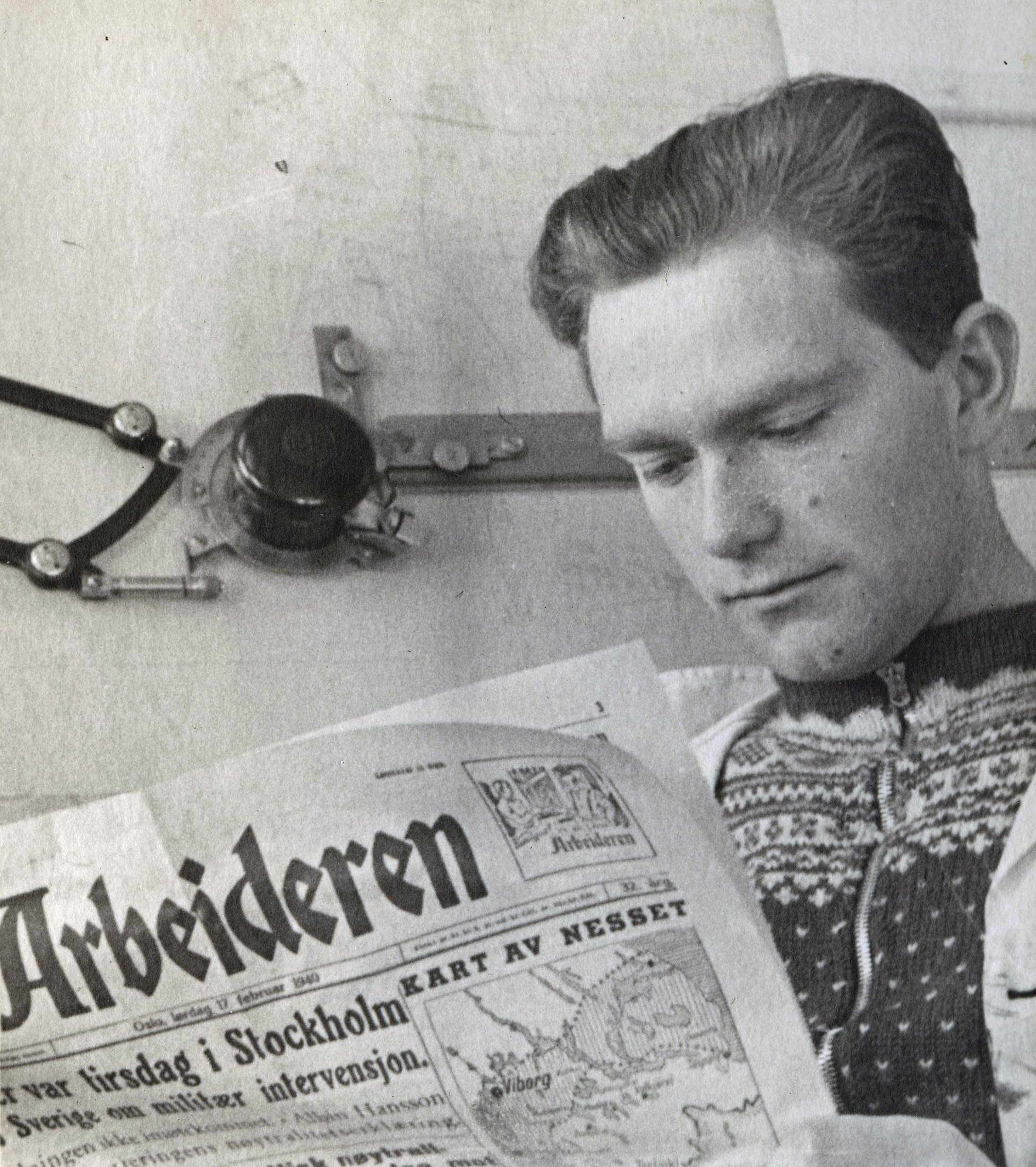 Format: Fotopositiv Dato / Date: Mars / April 1940 Fotograf / Photographer: Ukjent, mulig Johan Eggen Sted / Place: NTH, Trondheim Lenke / Link: Folk frå Årdal i tysk fangenskap (NRK) Eier / Owner Institution: Trondheim byarkiv, The Municipal Archives of Trondheim Arkivreferanse / Archive reference: Tor.H42.B58.F4238 Merknad: Fra Johan Eggens privatarkiv. Johan Eggens notat til bildet: "Höyer-Elefsen, Entr.firma arb. Vestland. Arrest /11-41" Nestvold, Oddvar, f. 10. 11. 1916 i Rennebu, sønn av baneform. Johan N. og Tine Toraas. B.ing. NTH 1940. Ing. forskj. entrepr.firmaer 1940-41, byggeleder Kgl. Norske Legasjons Flyktningekontor i Sverige 1943-44, ans. Statens Veivesen, Finnmark fylke fra 1946, avd.ing. 1949-59, o.ing. Troms fylke fra 1959. Bassøe, Bjarne: Ingeniørmatrikkelen Norske Sivilingeniører 1901-55 med tillegg (Oslo 1961) Oddvar Nestvold ble arrestert den 18.11.1941 og overført til Falstad 11.12.1941. Han rømte fra Falstad 19.05.1942.